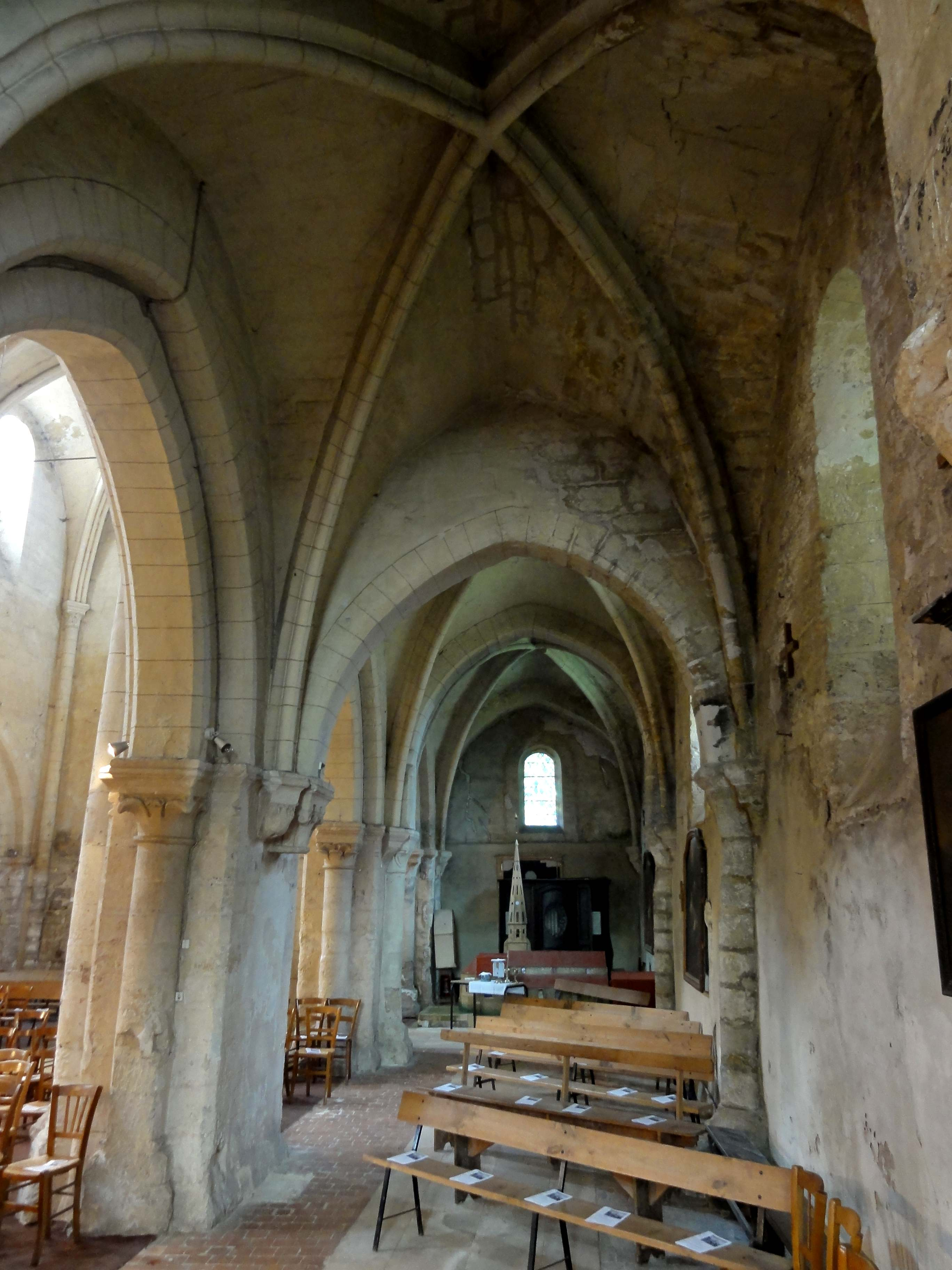 Église Saint-Pierre-et-Saint-Paul d'Acy-en-Multien (voir titre).